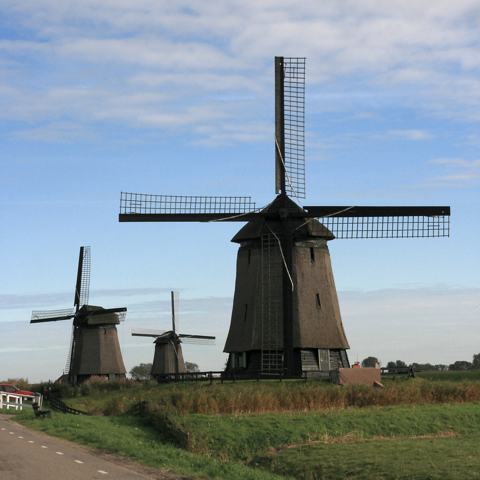 Schermerhorn: van links naar rechts: Ondermolen D, Bovenmolen E, Ondermolen C